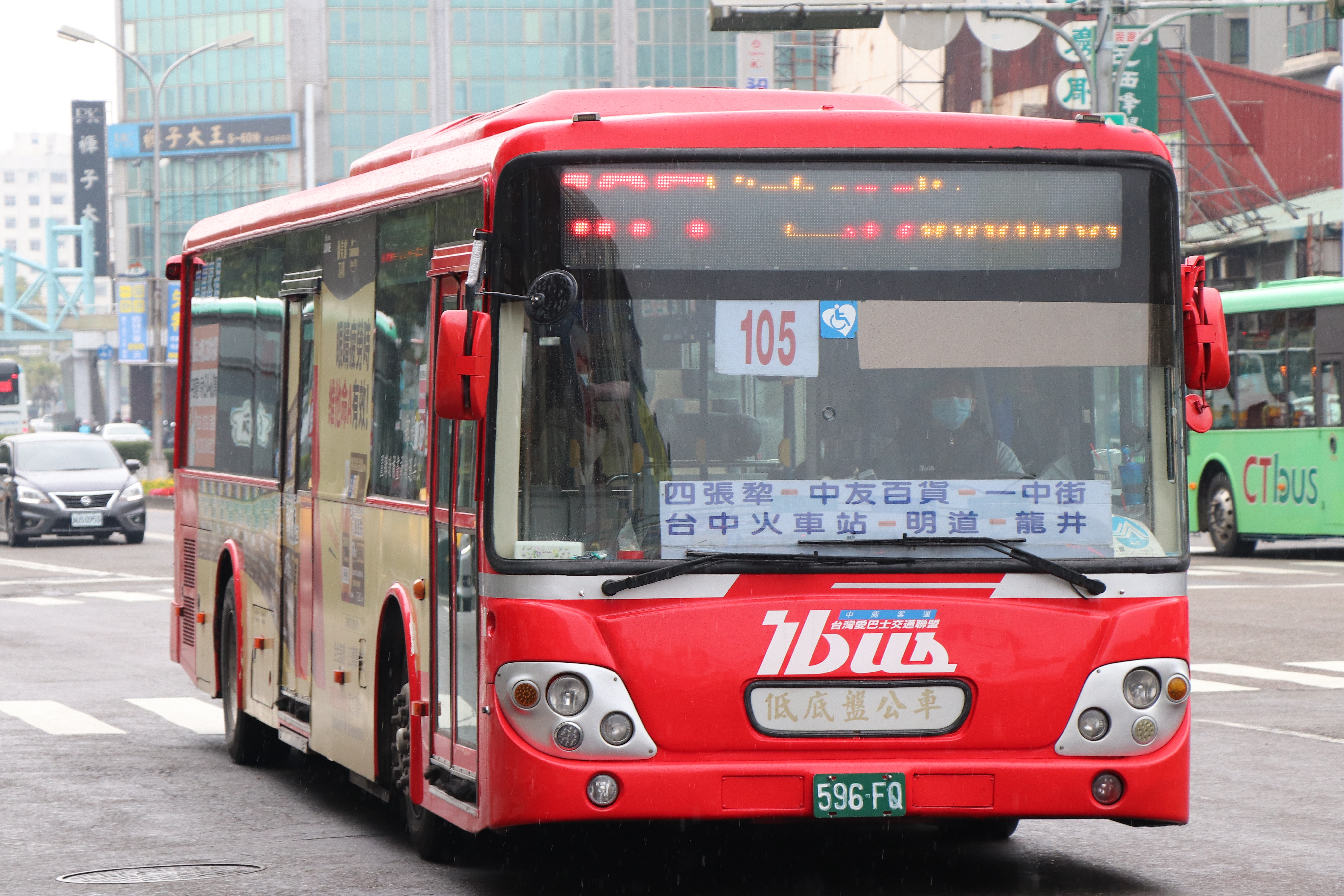 中鹿客運 大宇BS120CN大客車 596-FQ